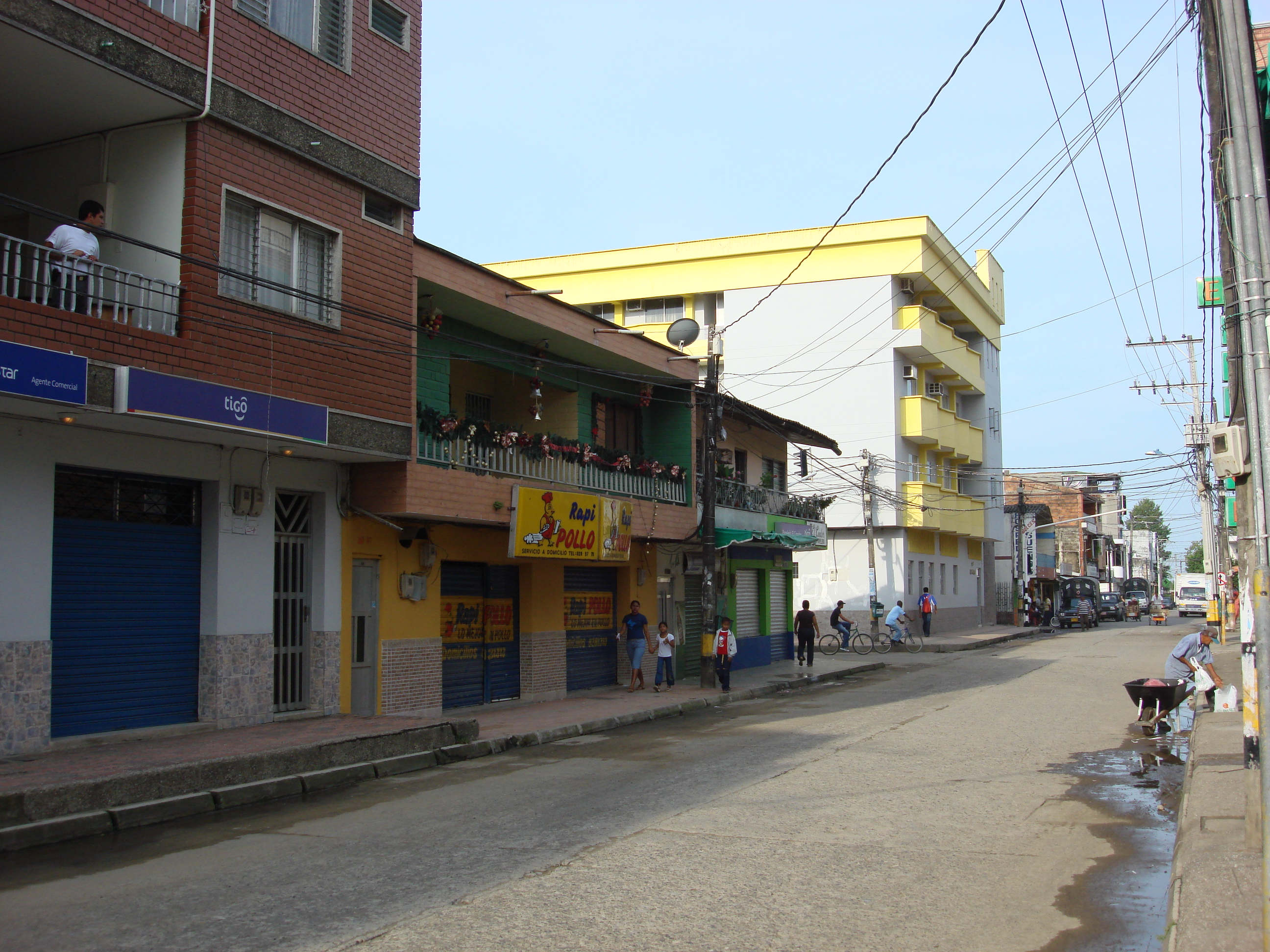 Apartado Antioquia Colombia Calle 98